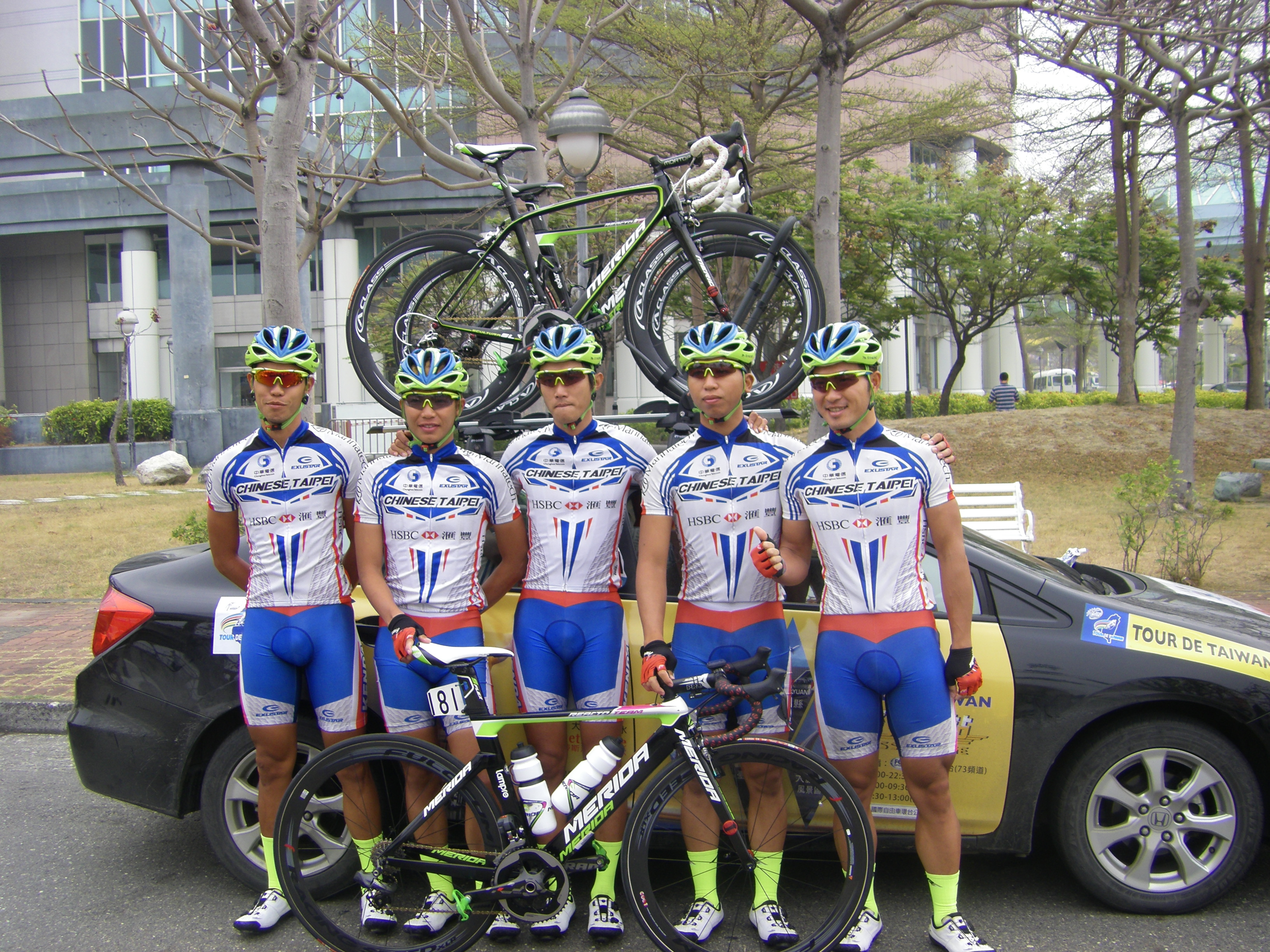 中文（台灣）: 中華亞運培訓隊在2014年國際自由車環台公路大賽第四站